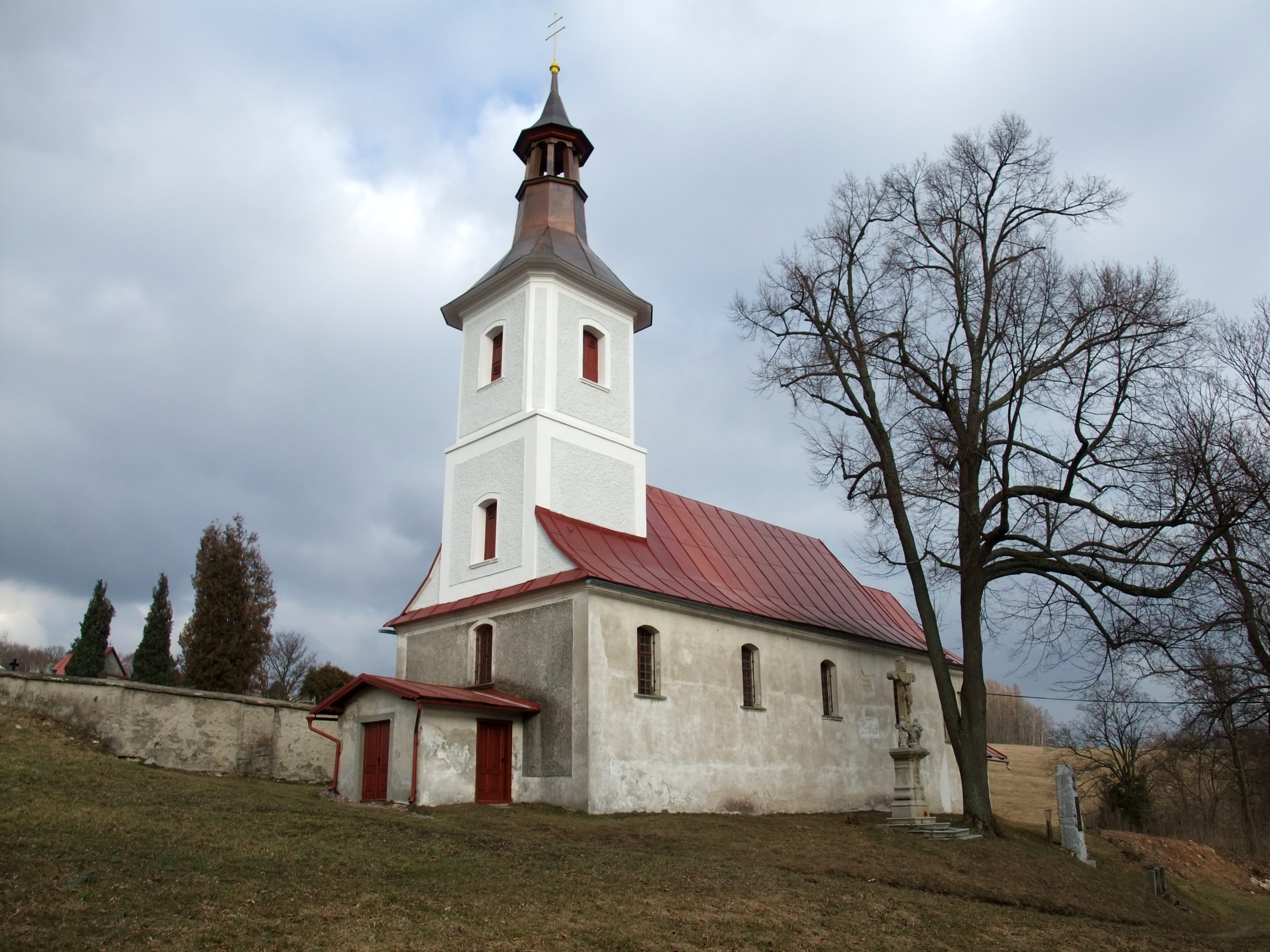 Kostel Neposkvrněného Početí P. Marie (Prostřední Lipka), SZ nad vsí, Prostřední Lipka